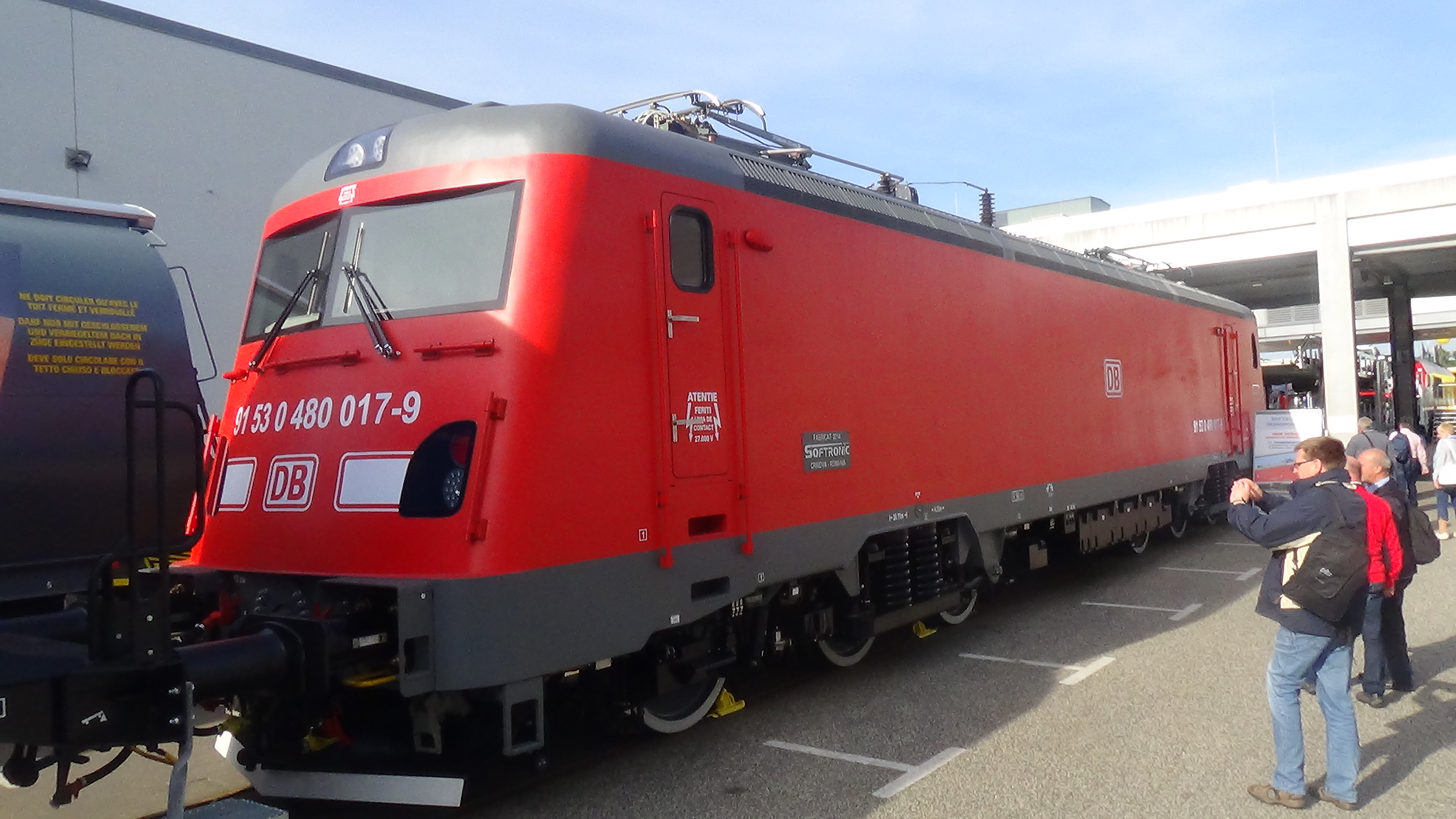 SC Softronic Srl DB Transmontana Locomotive 91 53 0 480 017-9